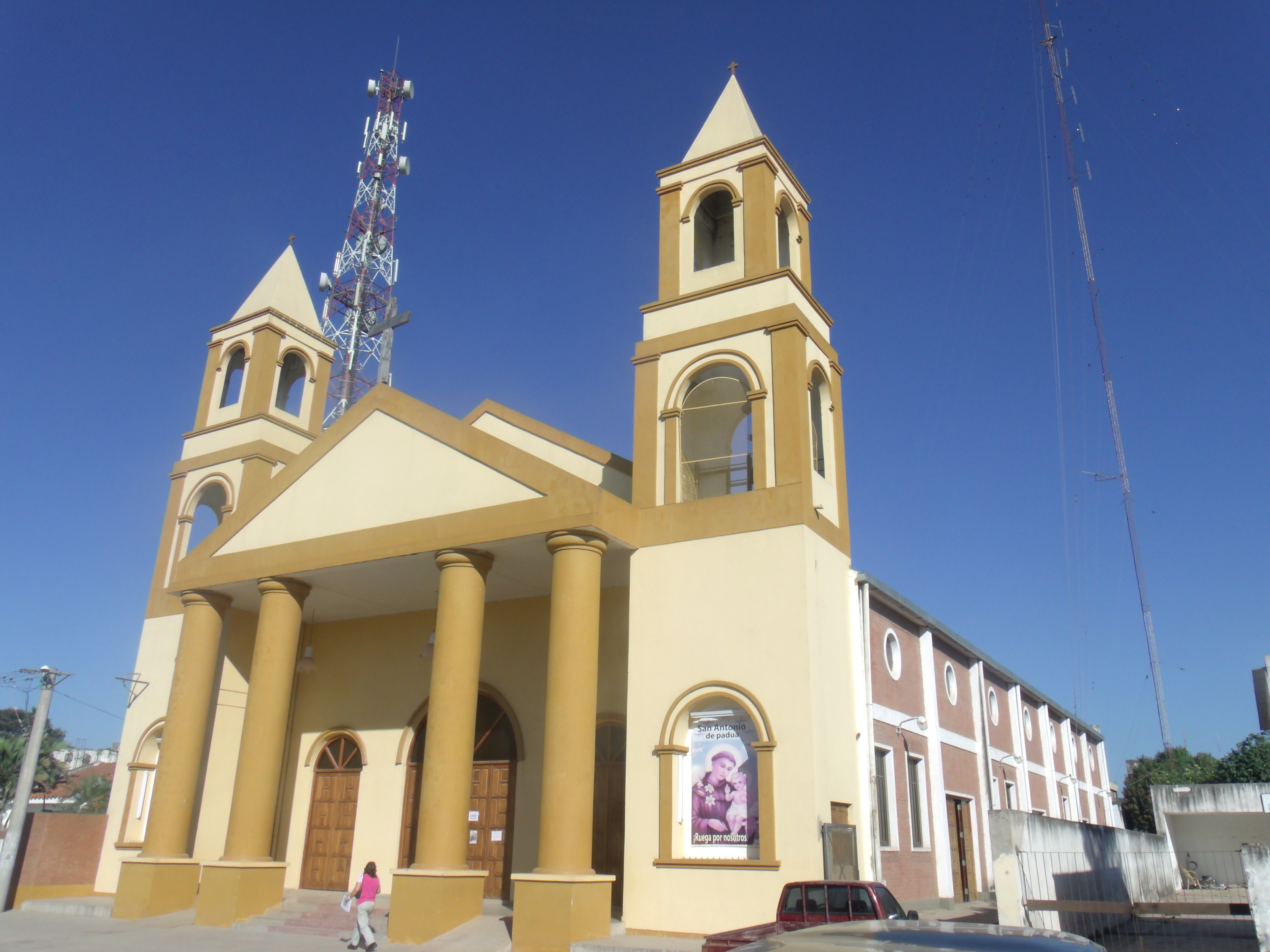 Fachada y lateral del principal templo católico de San Martín, Chaco